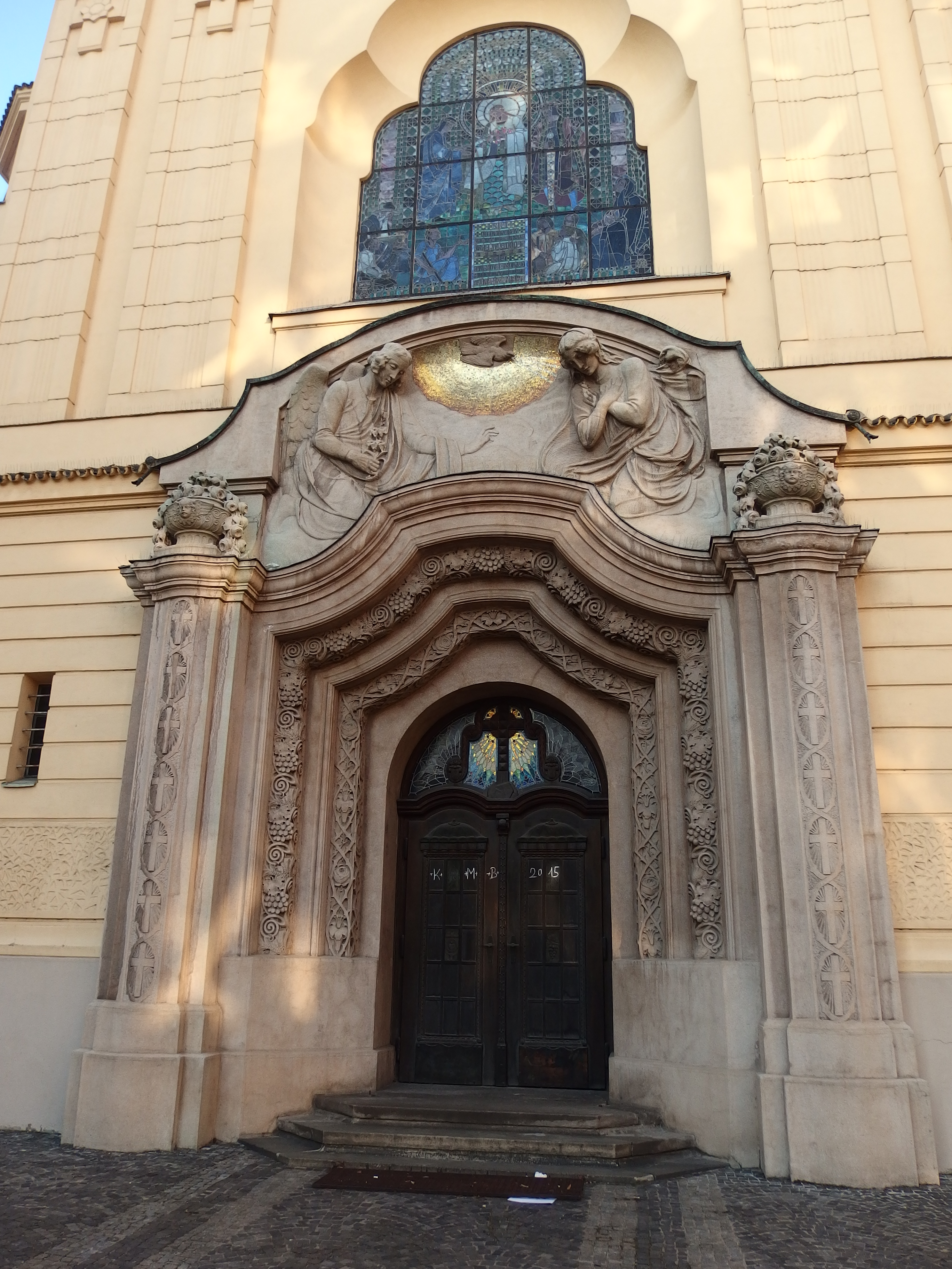 Kostel Neposkvrněného Početí Panny Marie, Křenová, parc. 76, Brno-střed, Trnitá.